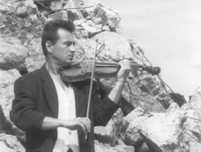 Irek Grabowski